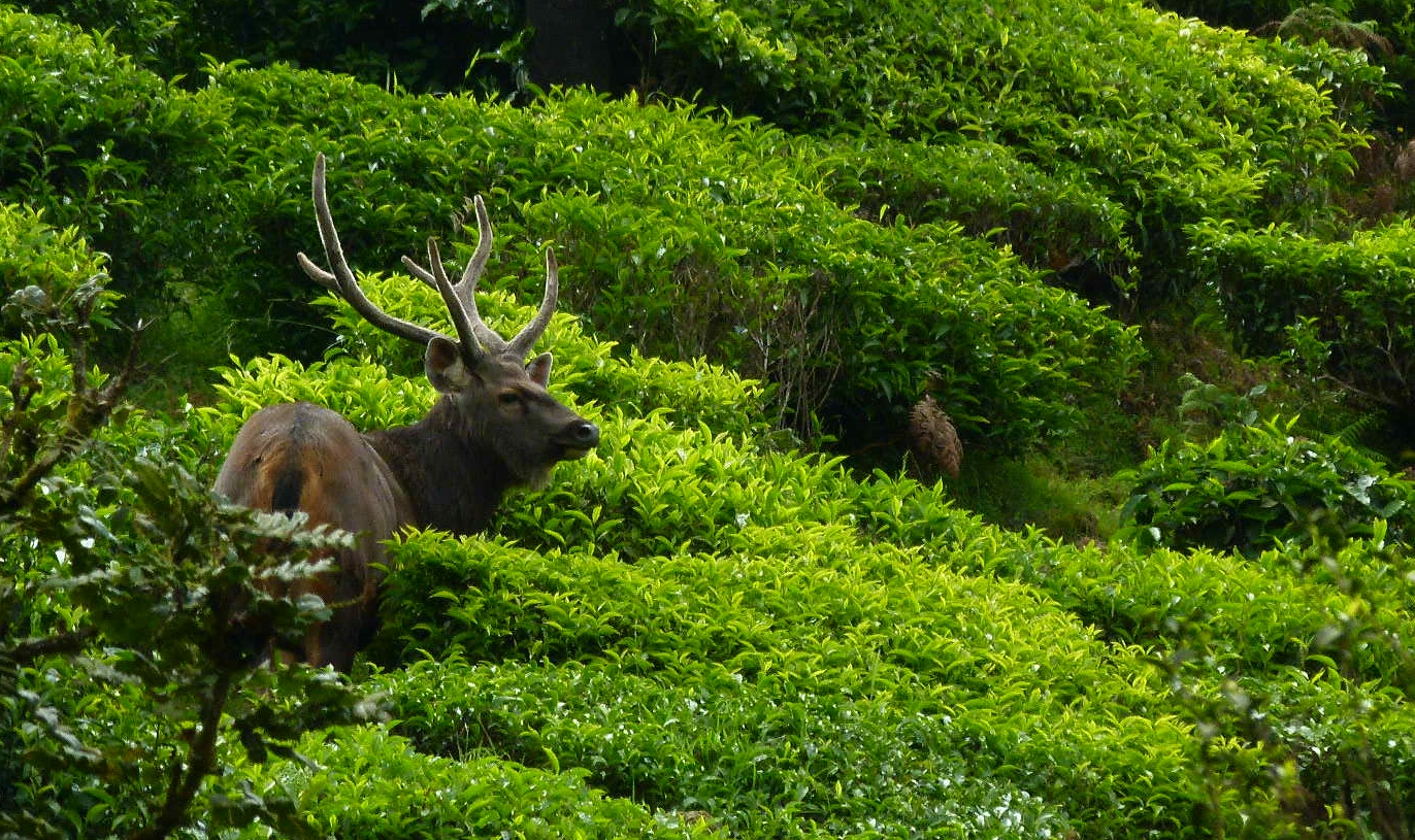 Sambhur stag in tea estate, Nilgiris, Korakundah